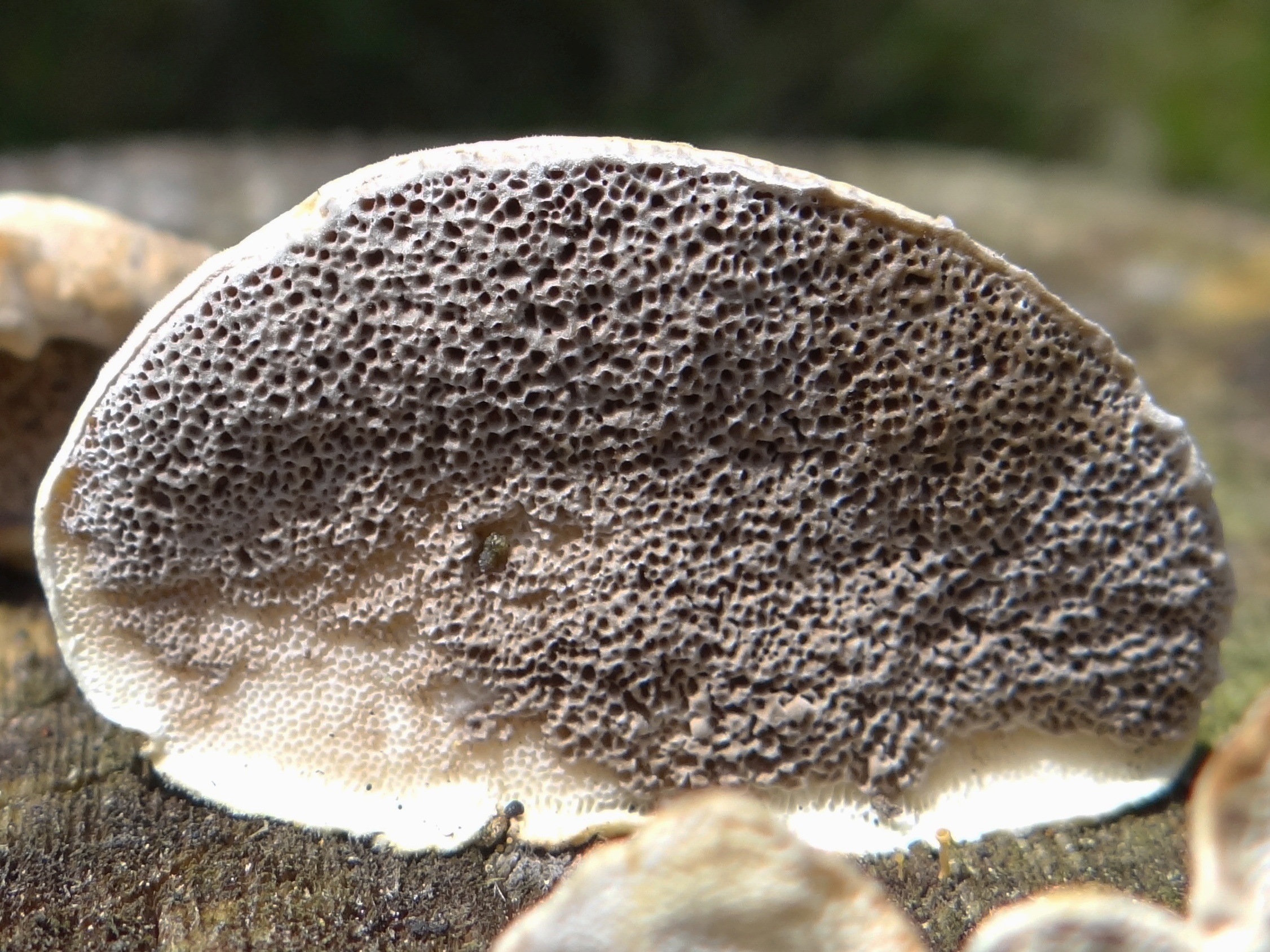 Bjerkandera fumosa (location: Slovakia, Magura Spiska, Jezersko)